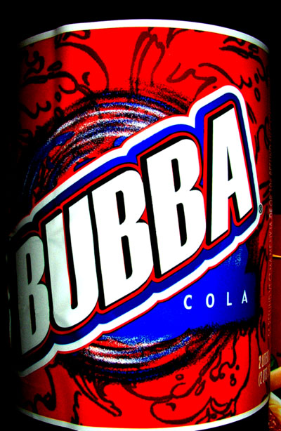 Bubba Cola label, 2 liter bottle